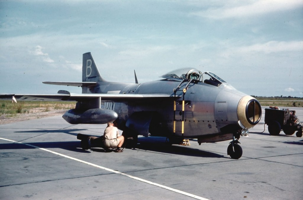 En ”spanings-Tunna” görs klar för uppdrag över Kongo. Avstånden var enorma. Trots klimatet och att alla flygplan var enmotoriga, kom alla hem efter avslutade uppdrag.